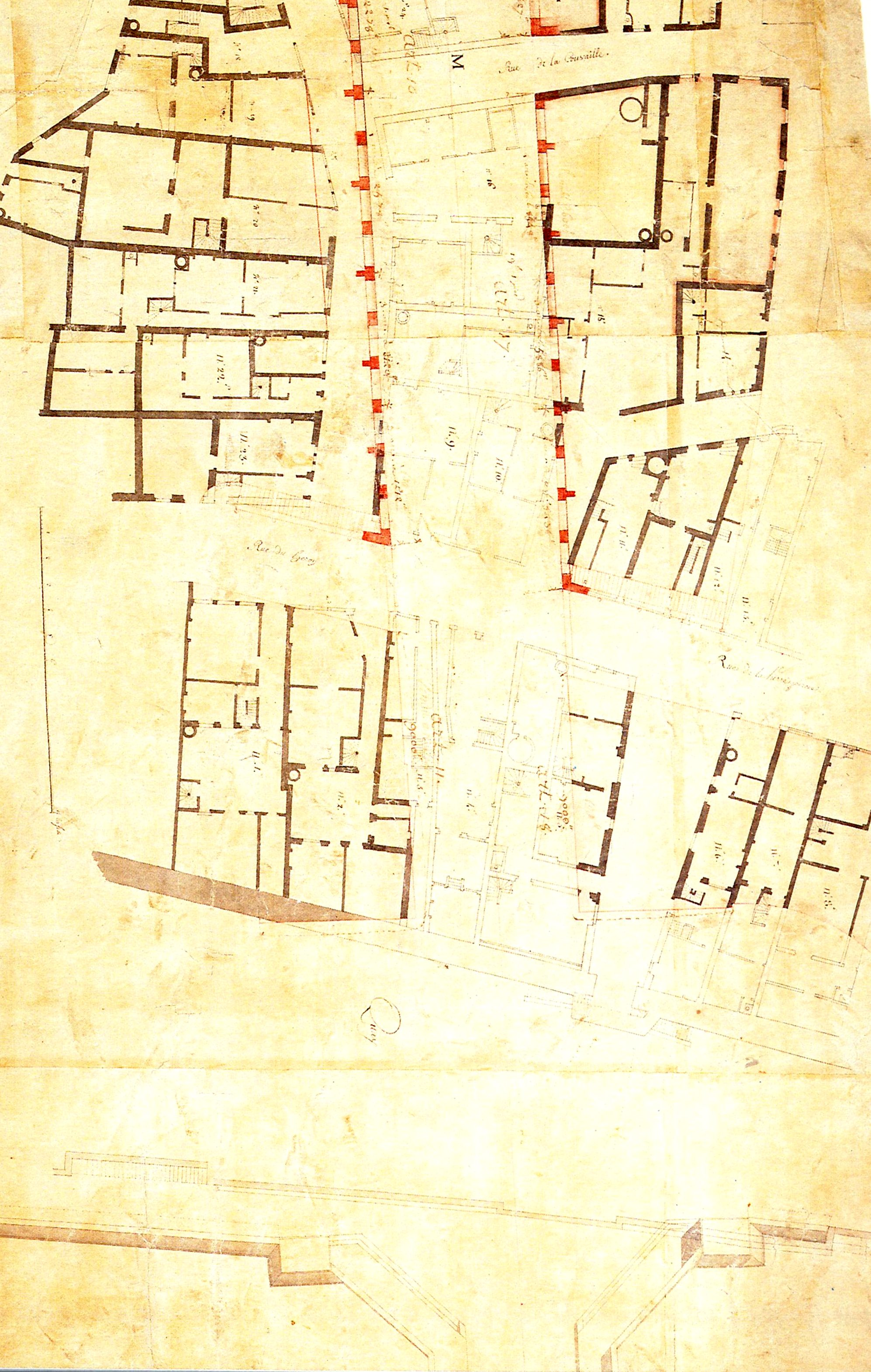 Plan du percement de la rue Royale en continuité de la construction du Pont George V, Orléans, Loiret, France